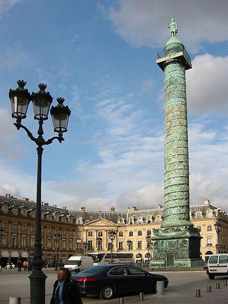 Ik heb deze foto van de Colonne de Vendôme in Parijs zelf gemaakt.